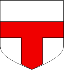 D'argent à la fasce-pal de gueules